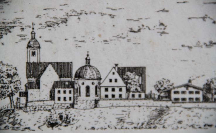 Hörmanshofen-Ottilienberg (Biessenhofen), der Ottilienberg mit Schloss, Wallfahrtskirche und kleine Rundkirche (zum Schloss gehörig) auf einer Zeichnung, um 1750.